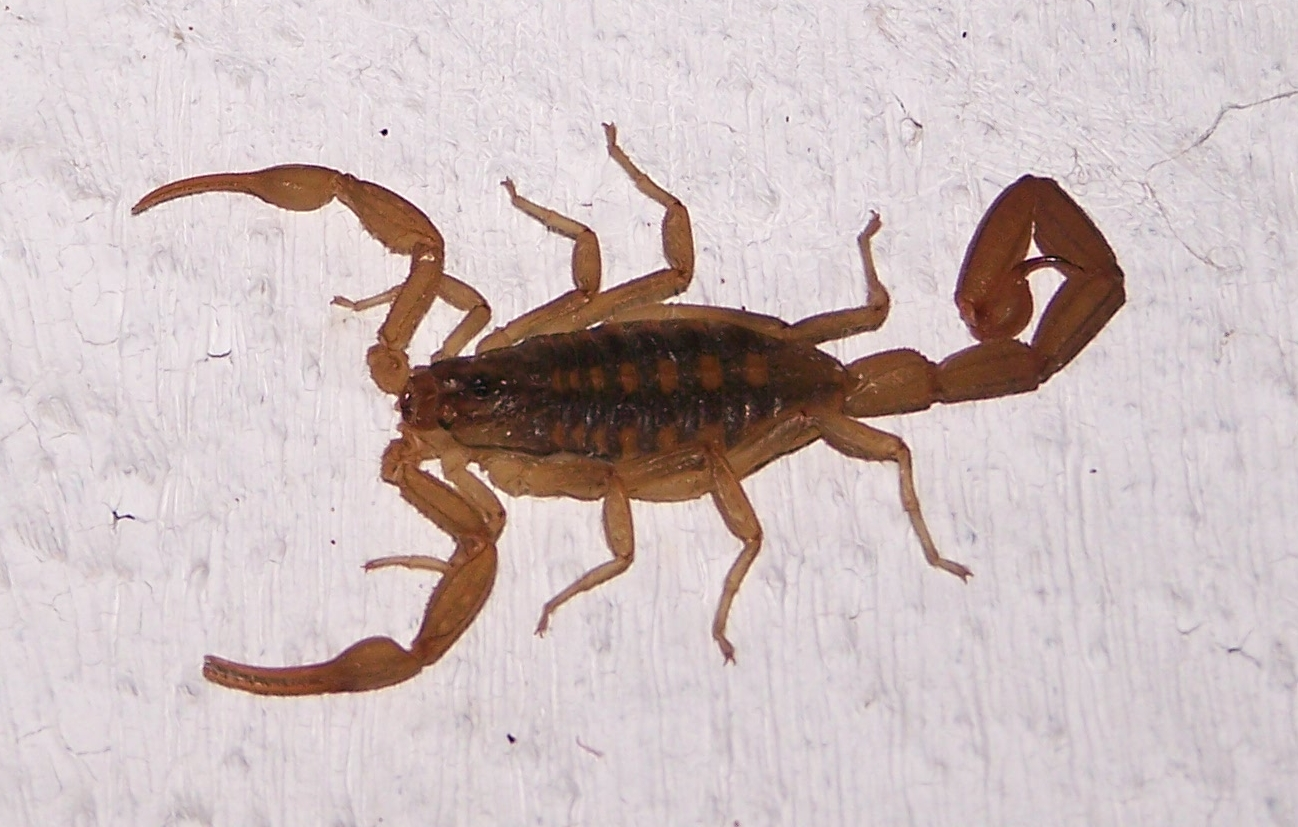 Centruroides suffusus (Alacran de Durango)